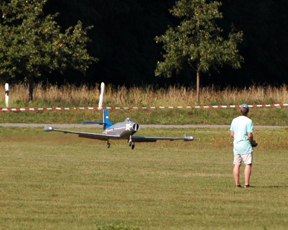 Flugtag Walldorf 2015